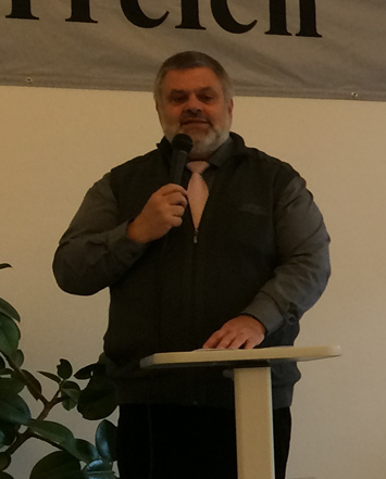 15 Jahre Heilsarmee Salztorzentrum. Karlheinz Hora am Rednerpult